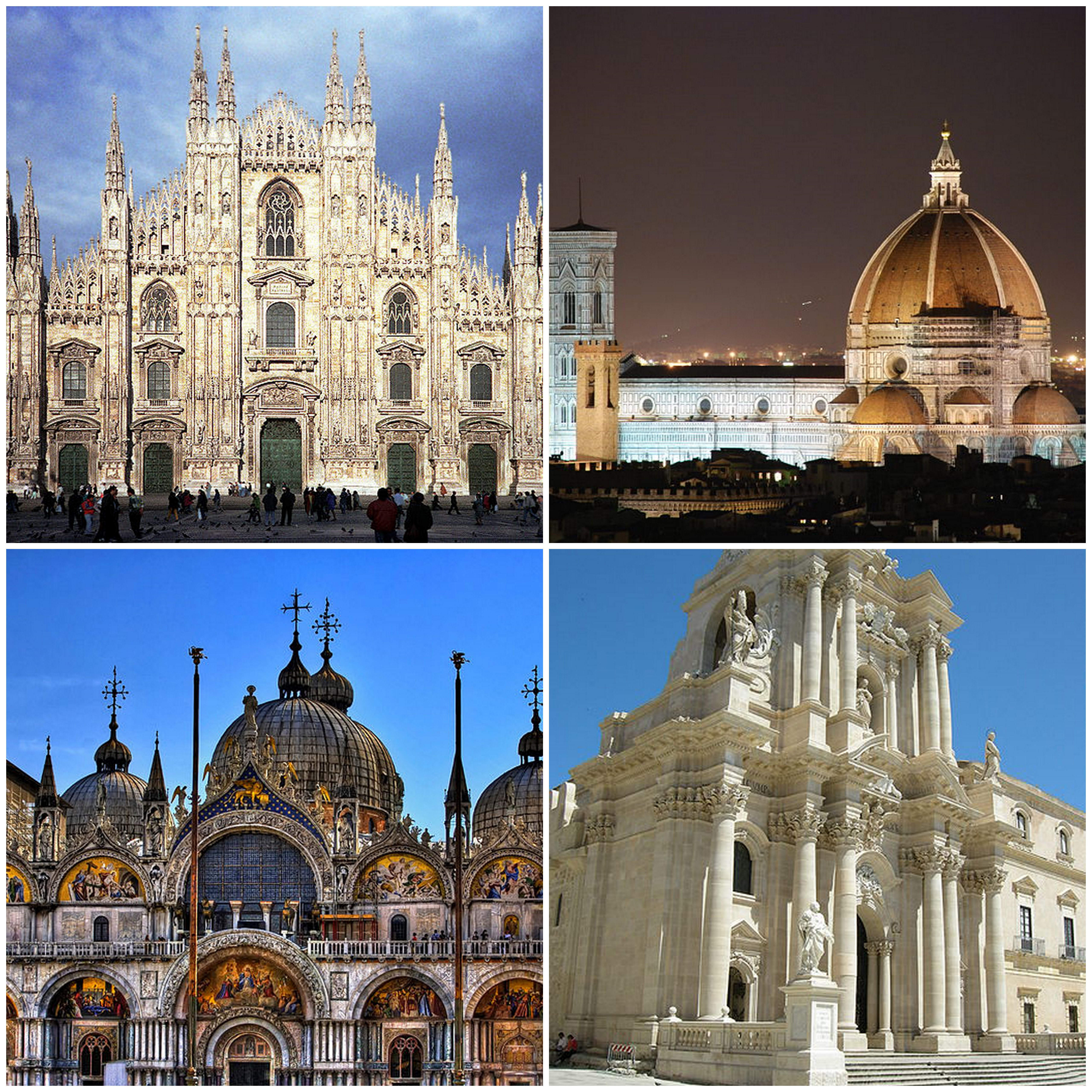 Collage di quattro foto su chiese italiane.